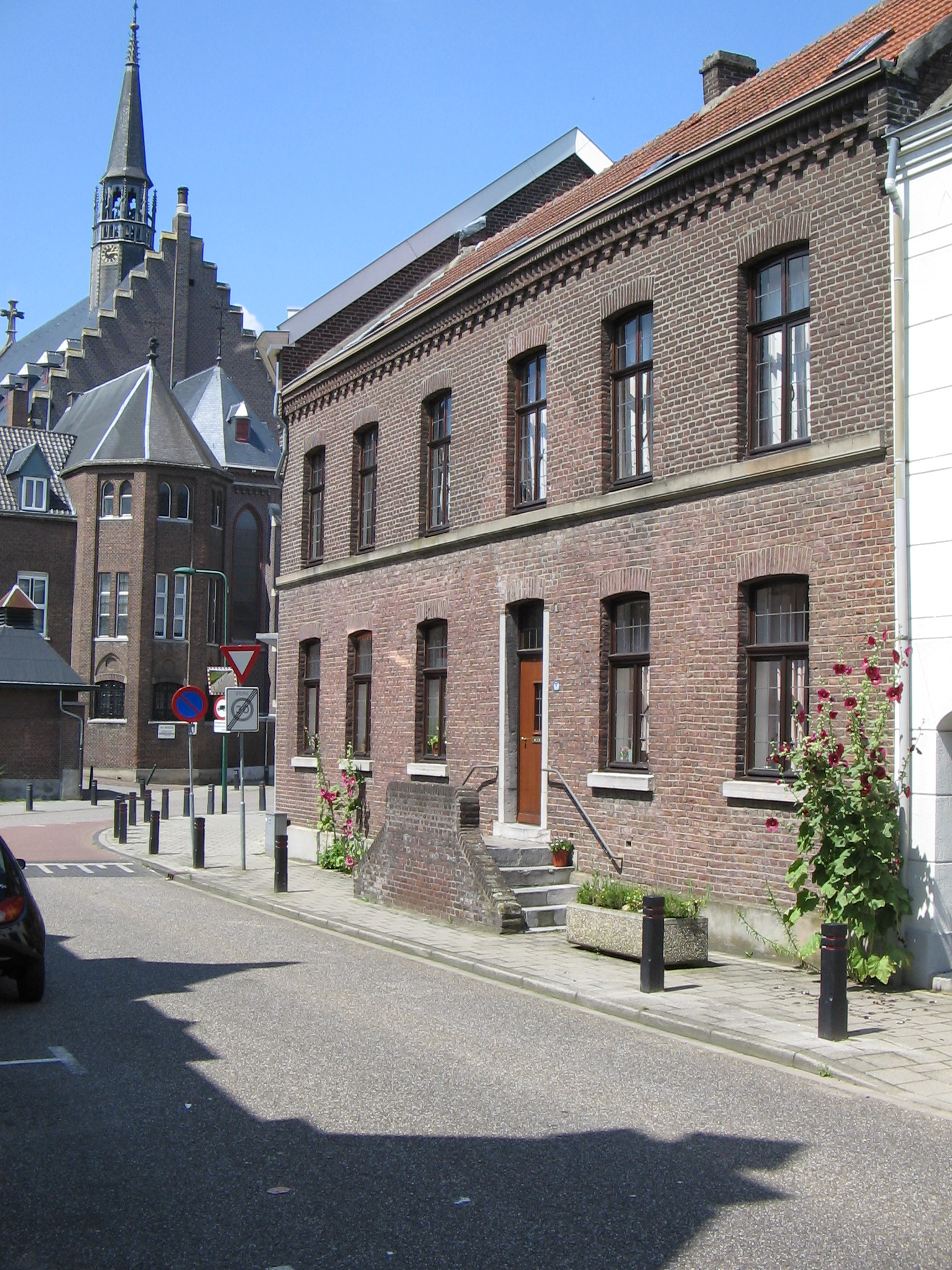 Huis met de trappen, Herkenbosscherweg 1, Roermond. Op de achtergrond de Kapel in 't Zand.